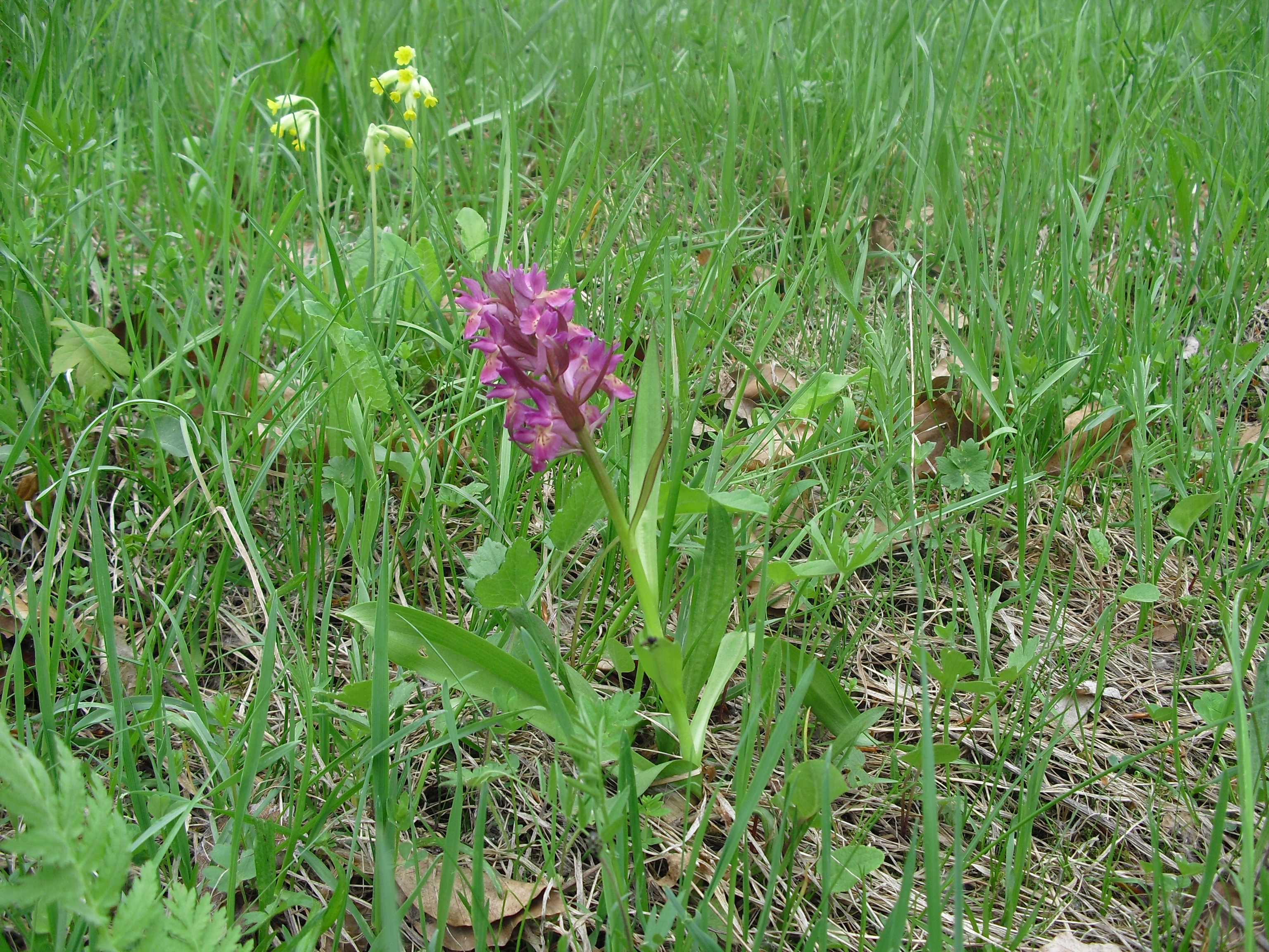 Ve Vlčí, přírodní rezervace u obce Vyškovec v okrese Uherské Hradiště.